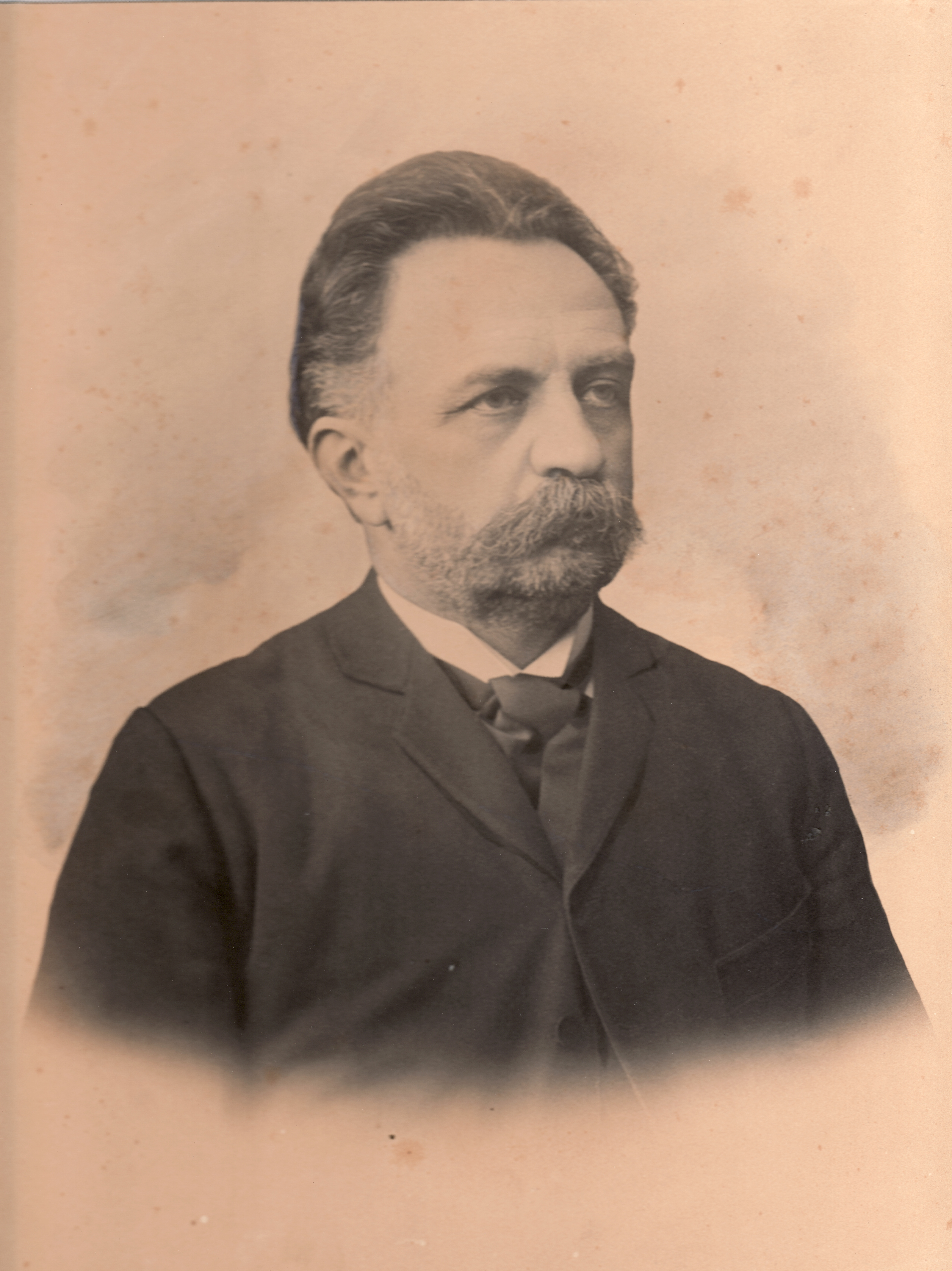 Gustav Winterholler (1833-1894), starosta Brna v letech 1880-1894